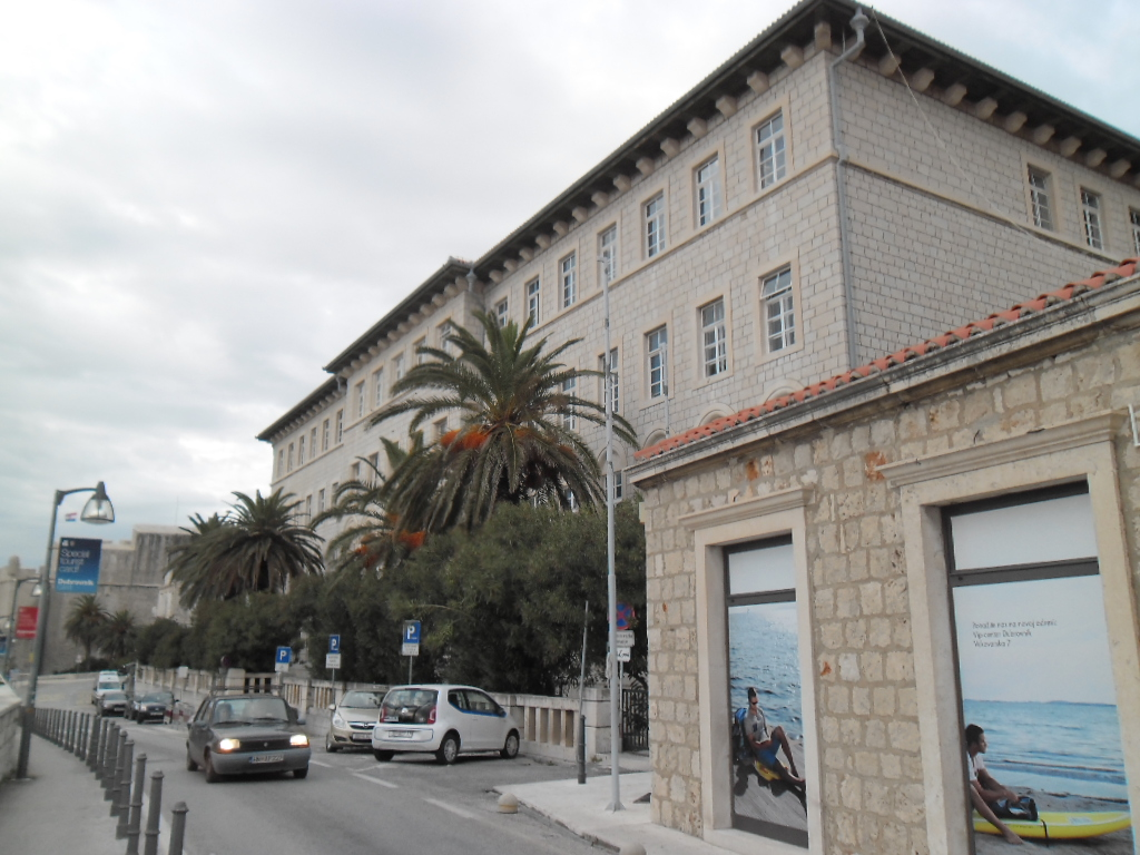 zgrada Gimnazije Dubrovnik